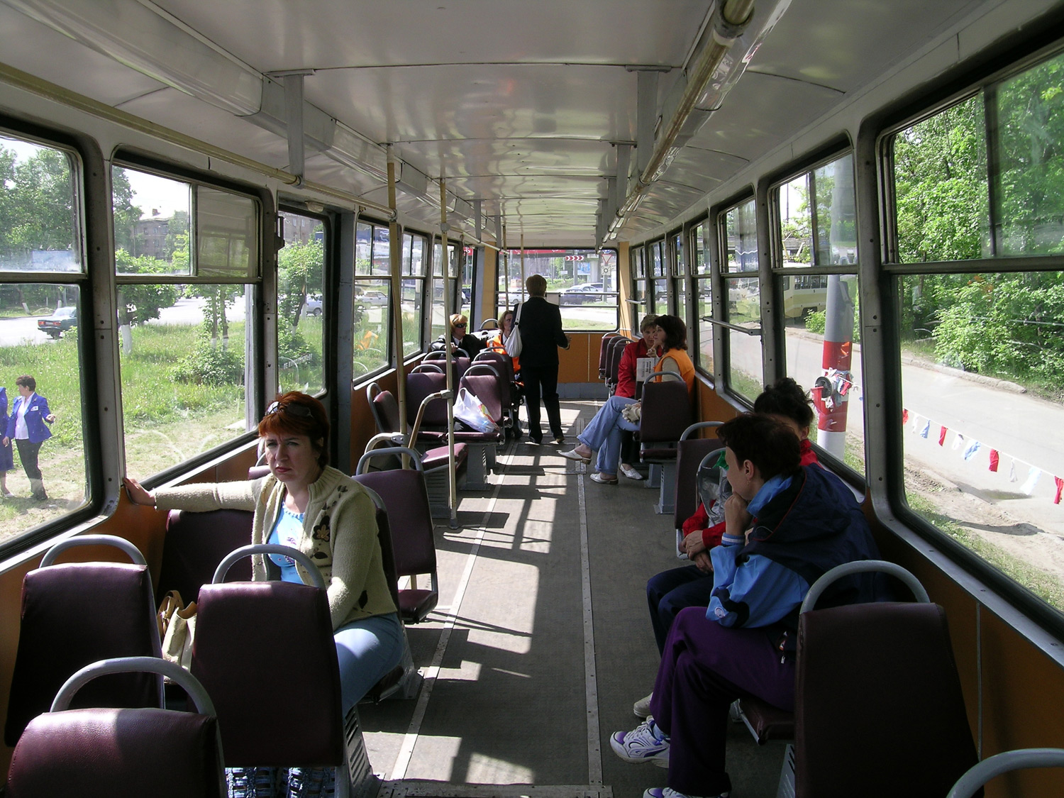 Трамвайный вагон 71-605 (КТМ-5). Вид в заднюю часть пассажирского салона.